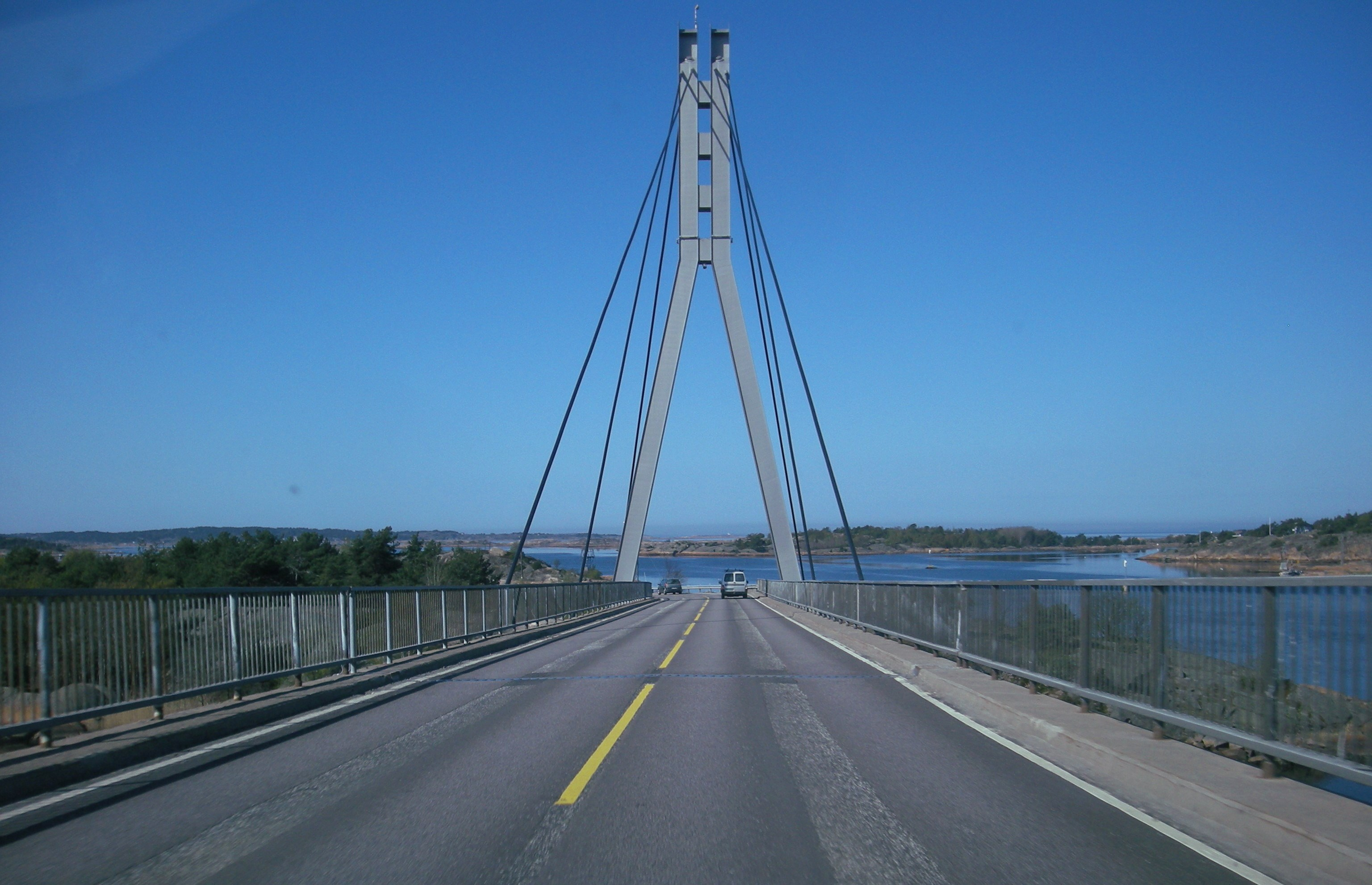 Puttesund bro fra Kjøkøya til Håholmen